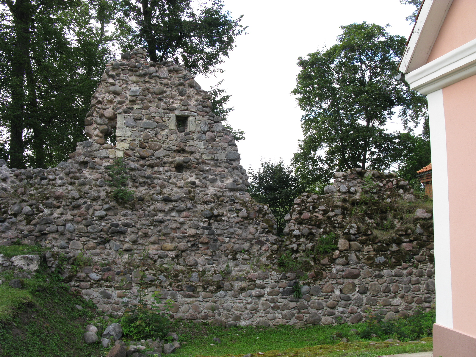 I eeslinnuse loodetiiva mantelmüür seespoolt.